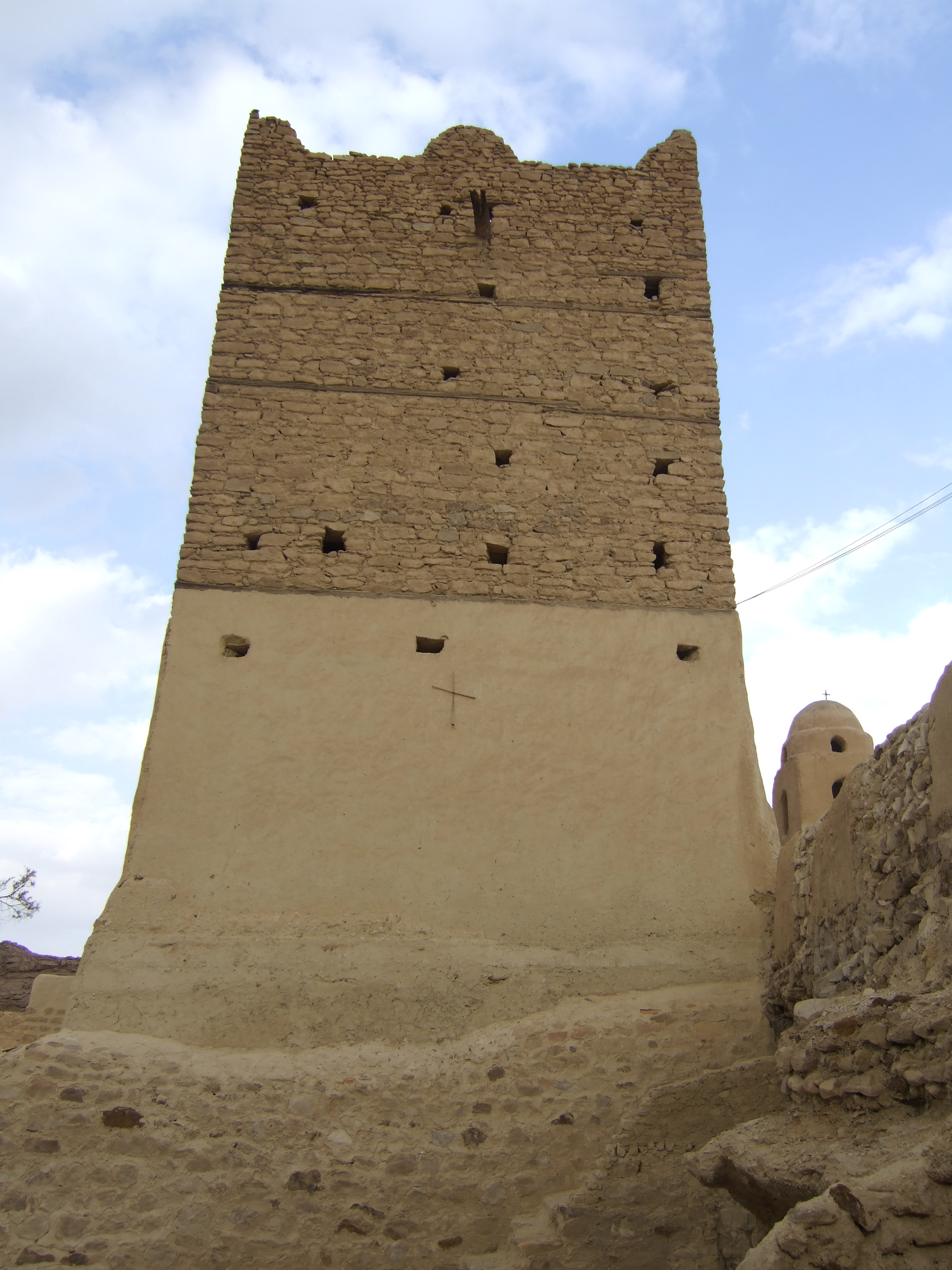 Foto LR - 2007